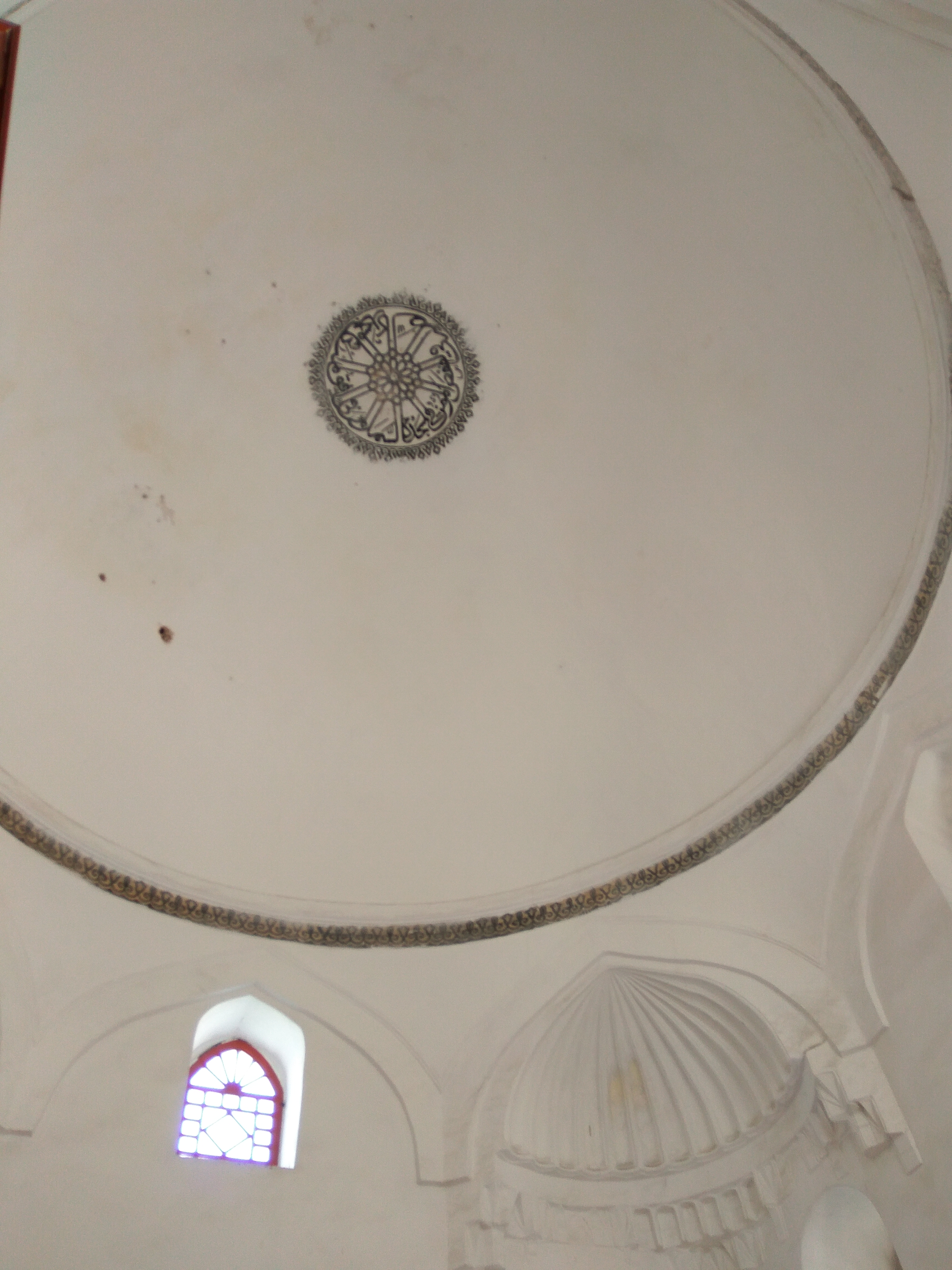 Xhamia e Muradies